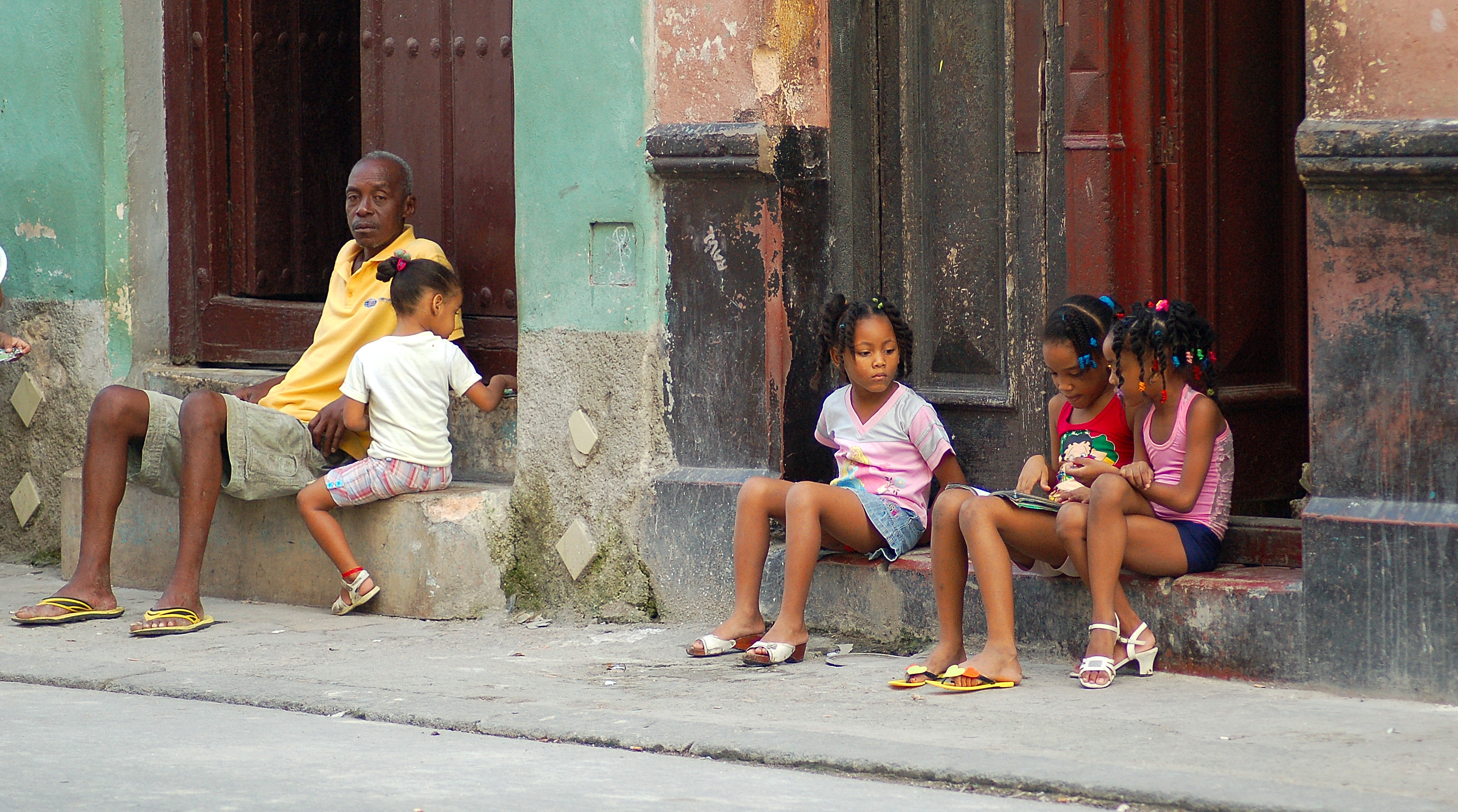 centro Habana novembre 2013 quartiere San Lazzaro